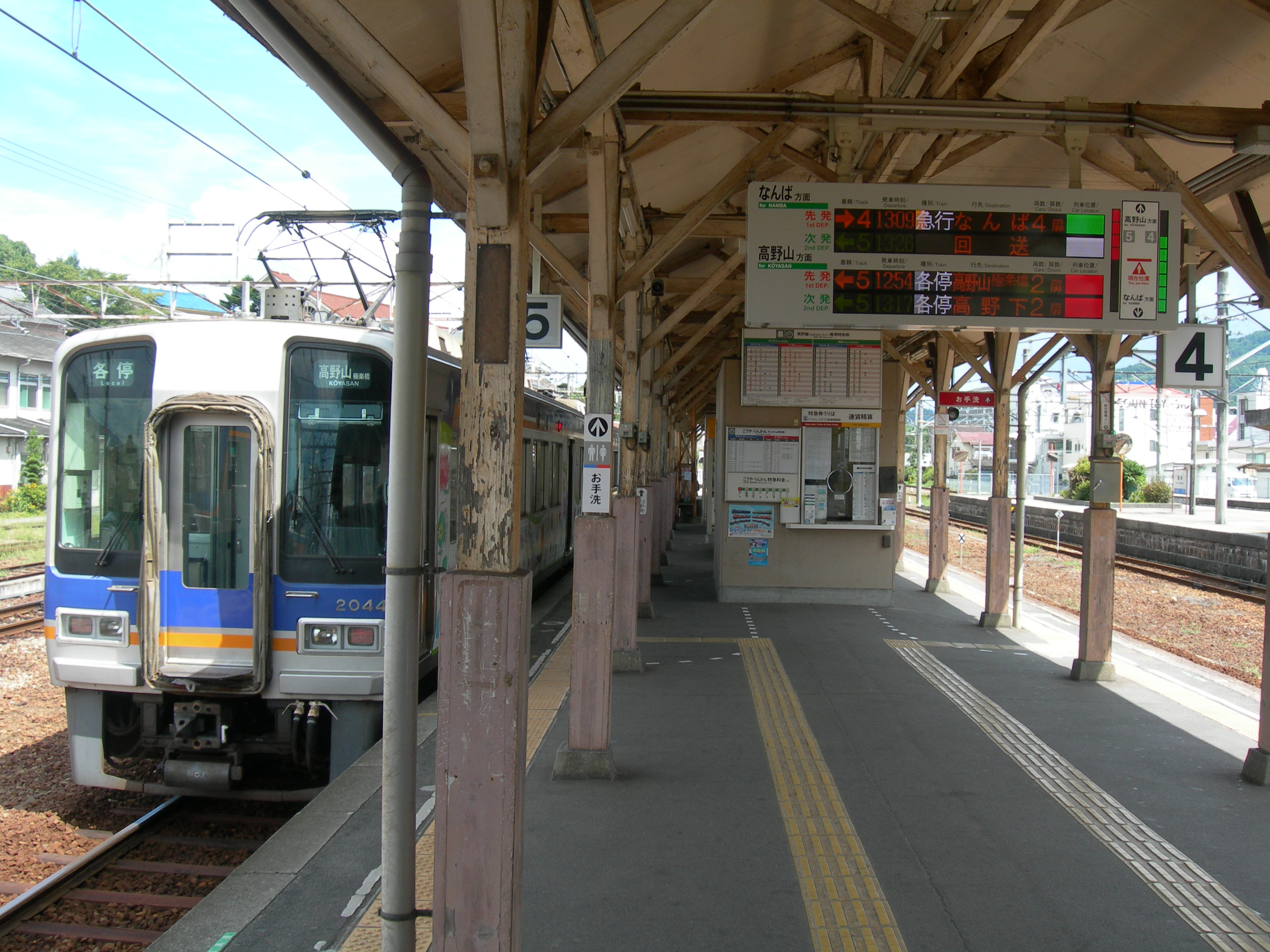 橋本駅 (和歌山県)プラットホーム